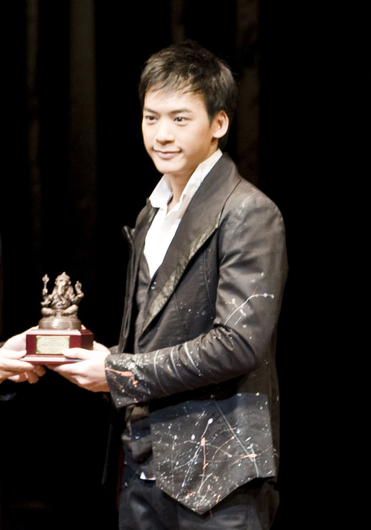 บี้ เดอะสตาร์ สุกฤษฎิ์ วิเศษแก้ว / นรม.เป็นประธานในพิธีมอบรางวัลงานวันภาษาไทยแห่งชาติ ประจำปี2552 ณ หอประชุมใหญ่ ศูนย์วัฒนธรรมแห่งประเทศไทย 29กรกฎาคม2552 (The Official Site of The Prime Minister of Thailand Photo by พีรพัฒน์ วิมลรังครัตน์)